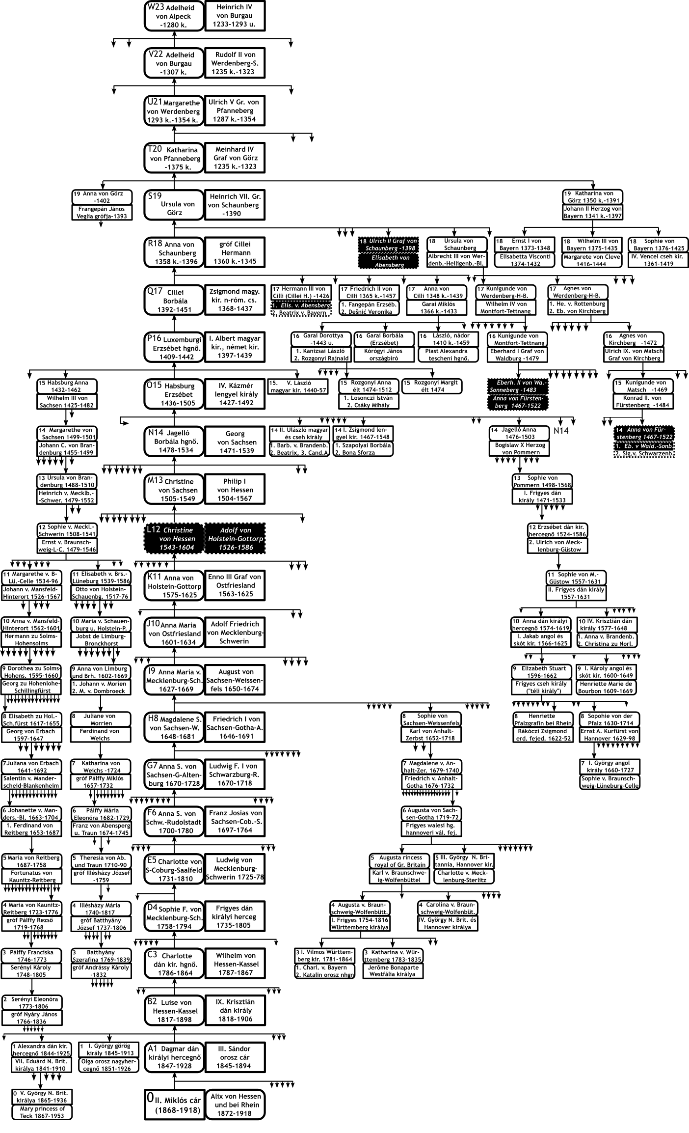 II. Miklós cár női ősutódtáblája. Szegedi László, Általános genealógia. Budapest, 2015. 527. (második préselés) Szegedi László által bevezetett genealógiai tábla az mtDNS, illetve az Y-DNS alapú rokonság követésére. The ancestor-desdendats chart of Tsar Nicholas II of Russia by László Szegedi, Általános genealógia. (Comprehensive Genealogy) Budapest, 2015. p. 527. A genealogical chart introduced by László Szegedi to trace the kinship by means of mtDNA or Y-DNA descendance.